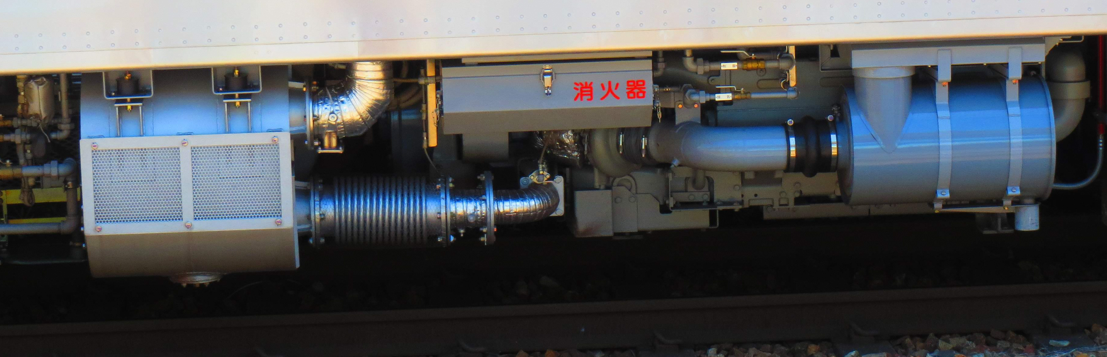 JR東日本GV-E400系気動車 DMF15HZD-G形